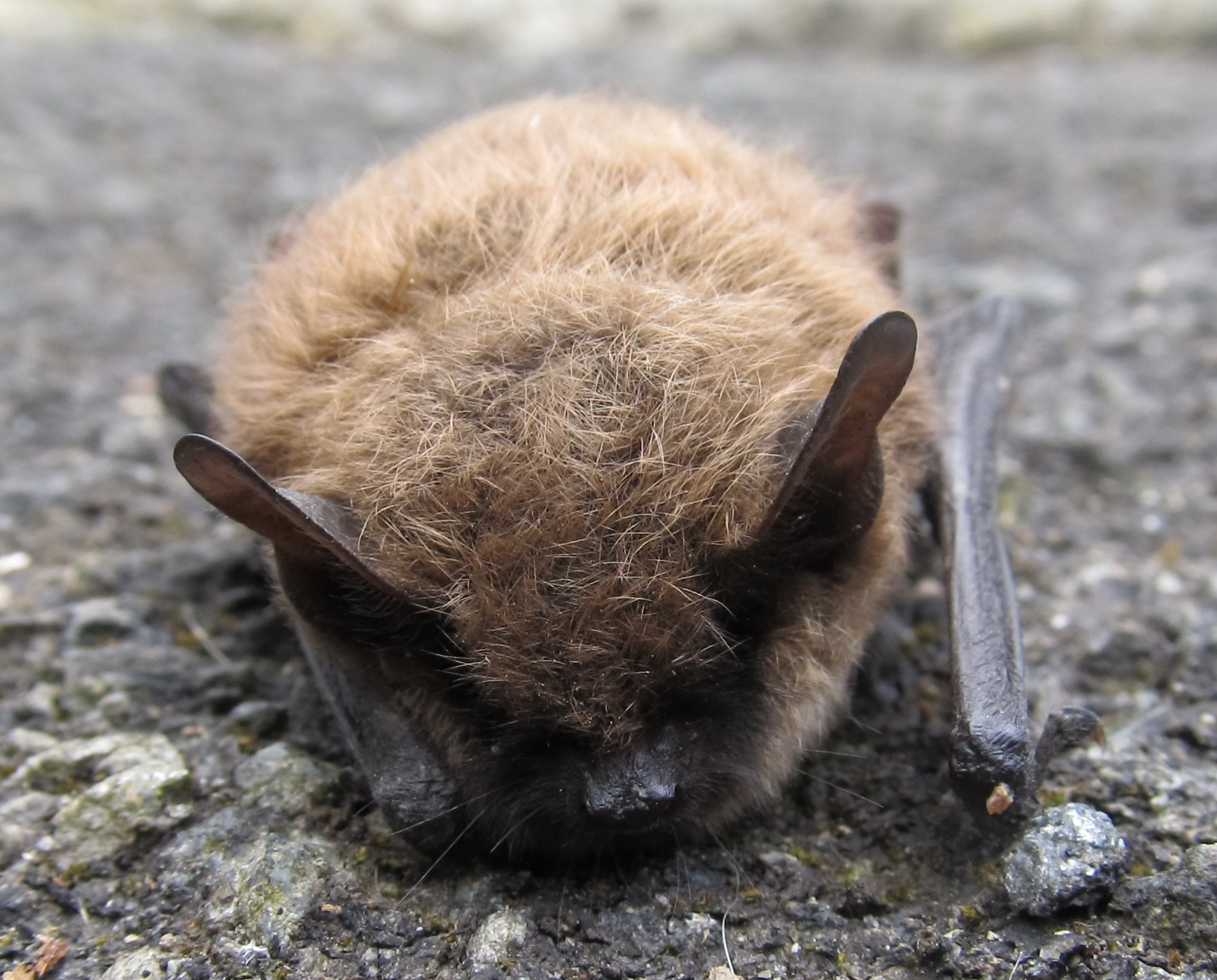 Kleine Bartfledermaus (Myotis mystacinus), fotografiert in Schmallenberg-Lenne (Germany)